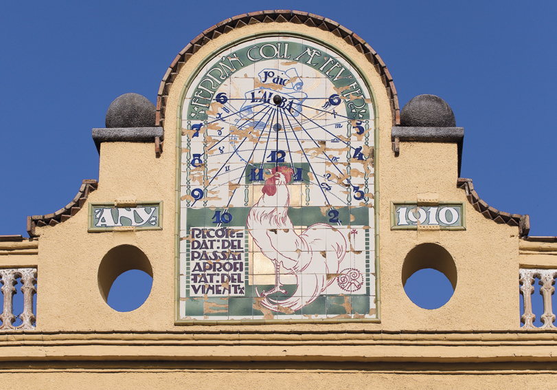 Casa Coll a Borrassà